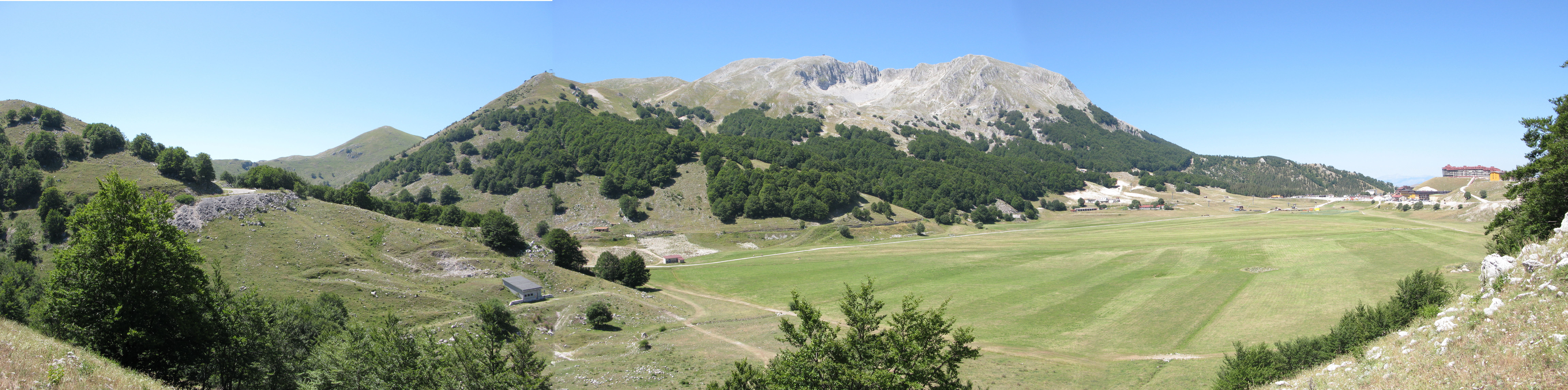 Veduta panoramica del pianoro di Campitello Matese